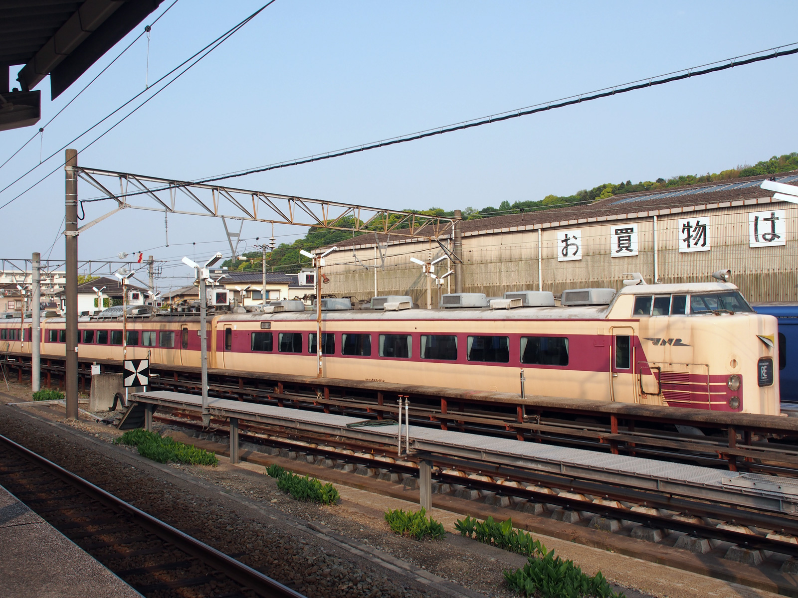 JR牧駅（大分県大分市）